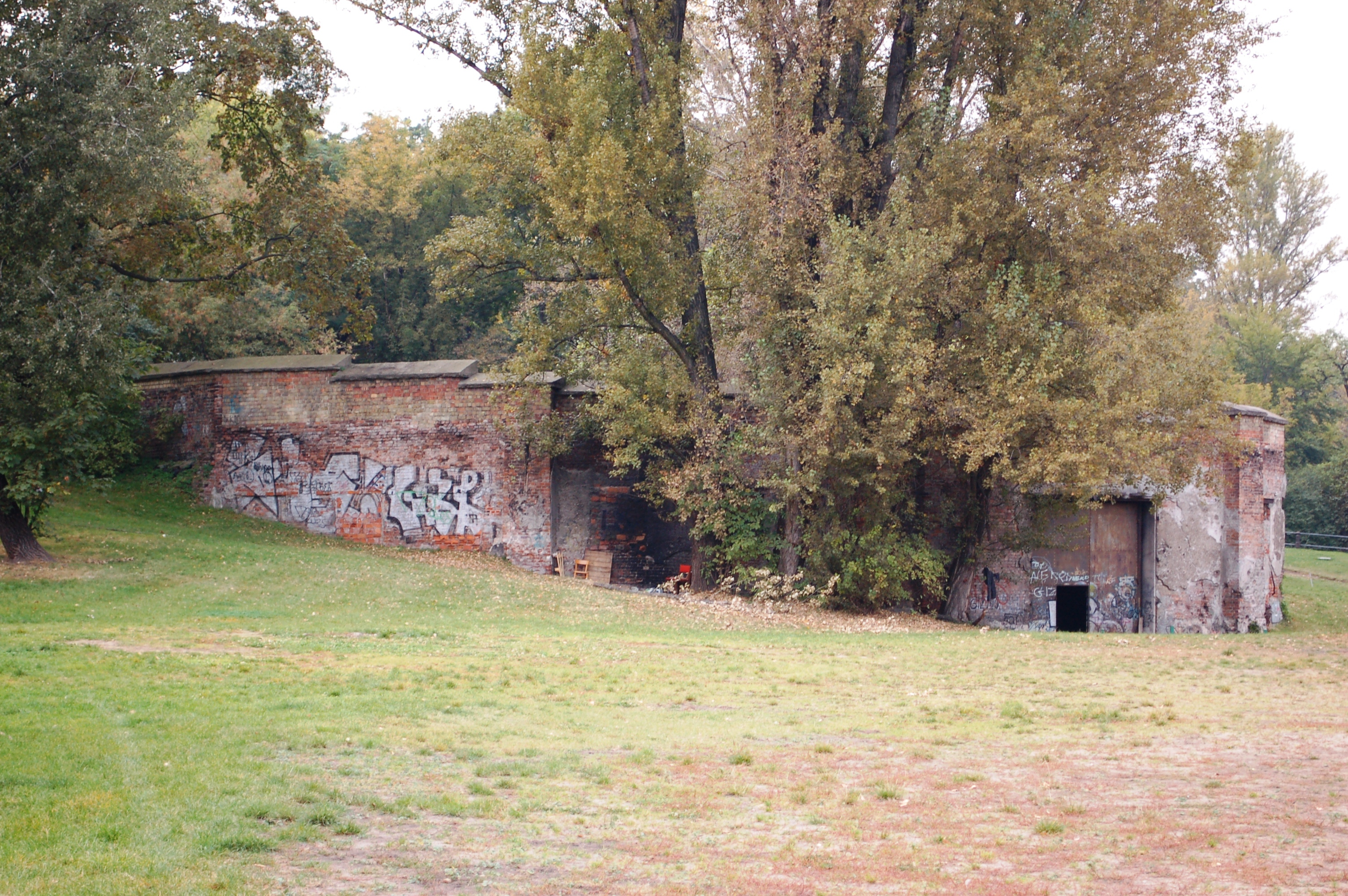 Skarpa warszawa Powisle